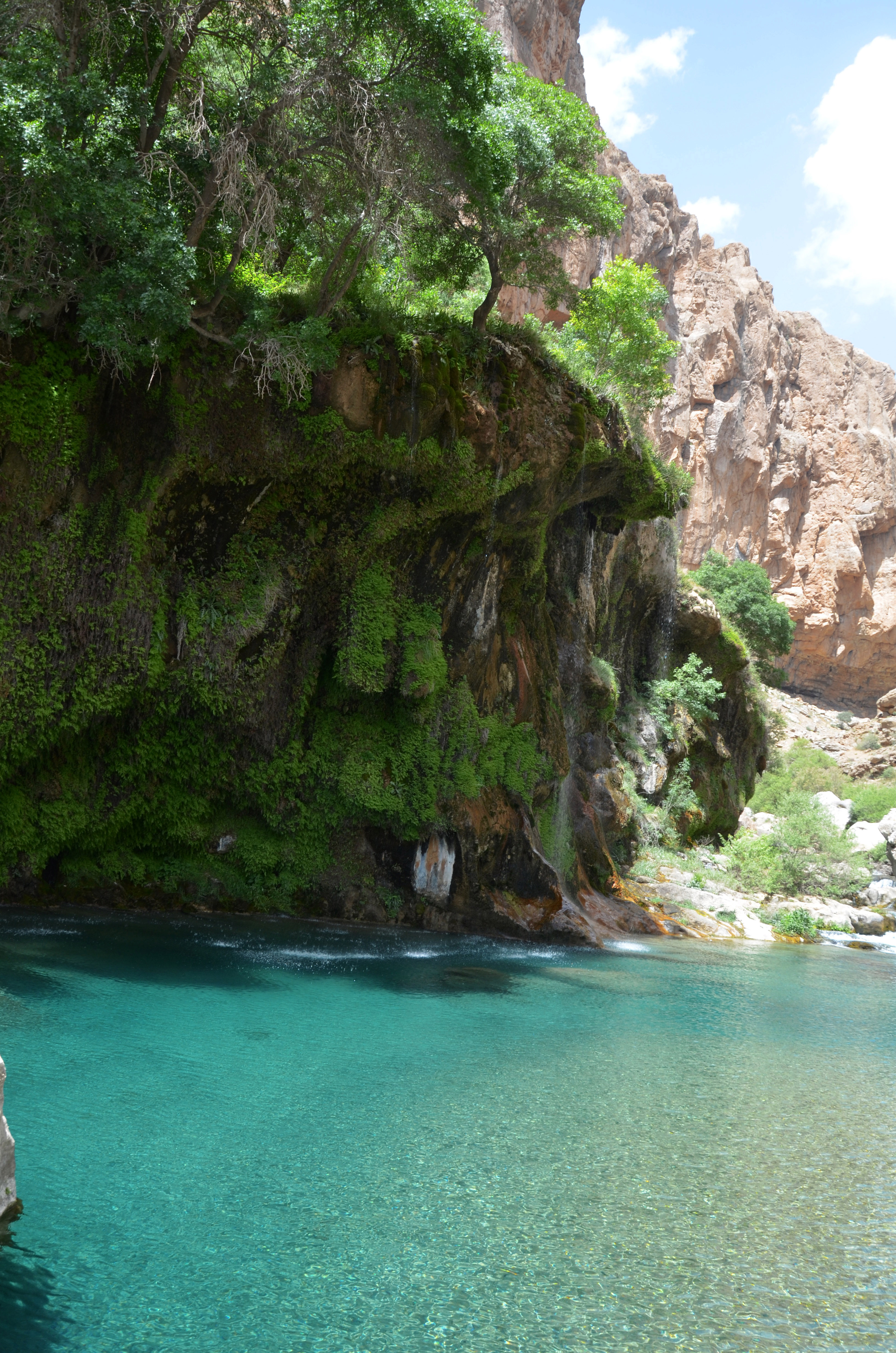 Fars - Seddeh - Tange Boragh